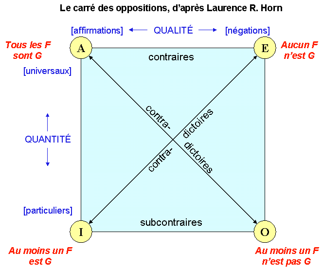 Le carré des oppositions, d'après Laurence R. Horn